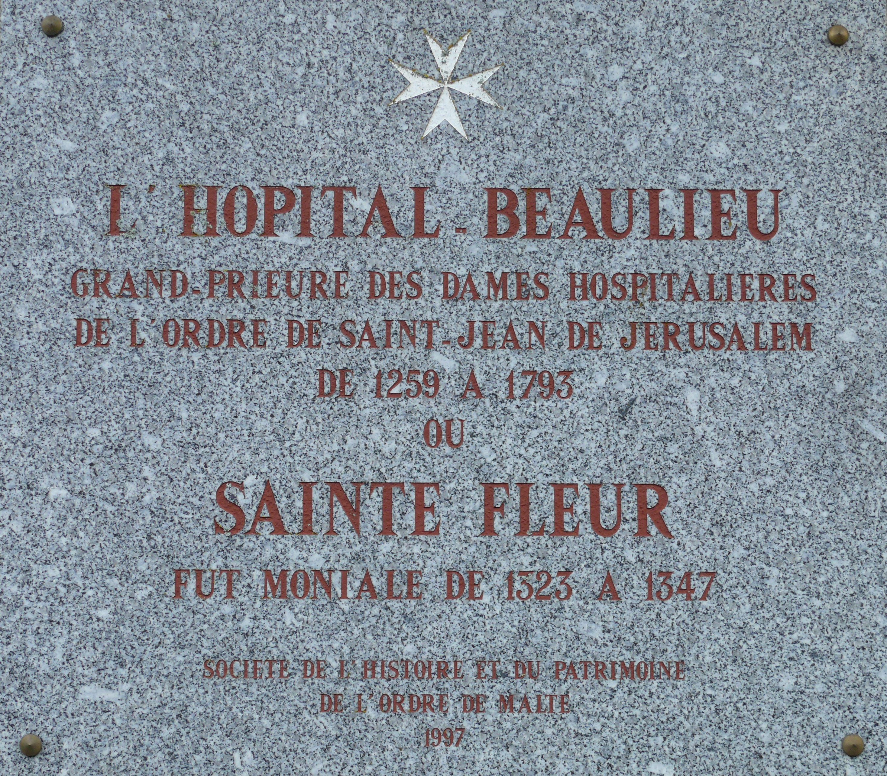 Issendolus - L'Hôpital-Beaulieu - Plaque commémorative